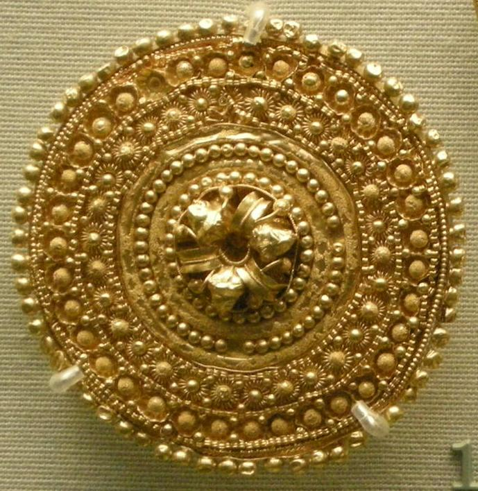 Arte etrusca, orecchino d'oro con rosetta tra bande concentriche, 530-480 ac. circa